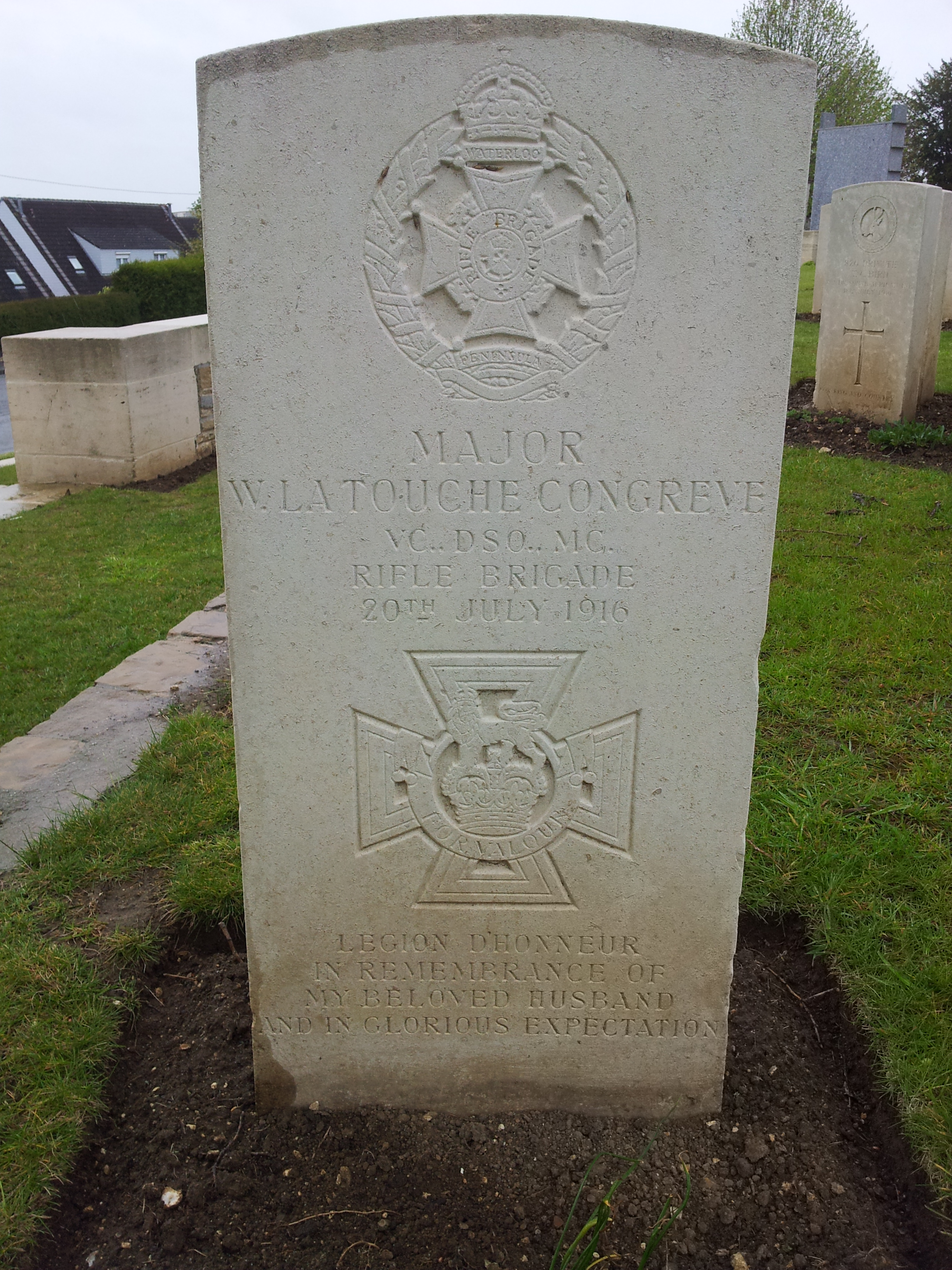 Tombe du Major W. La Touche Congreve VC DSO MC à Corbie Cemetery